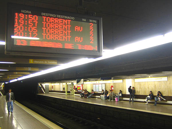 Estació de MetroValencia Túria.